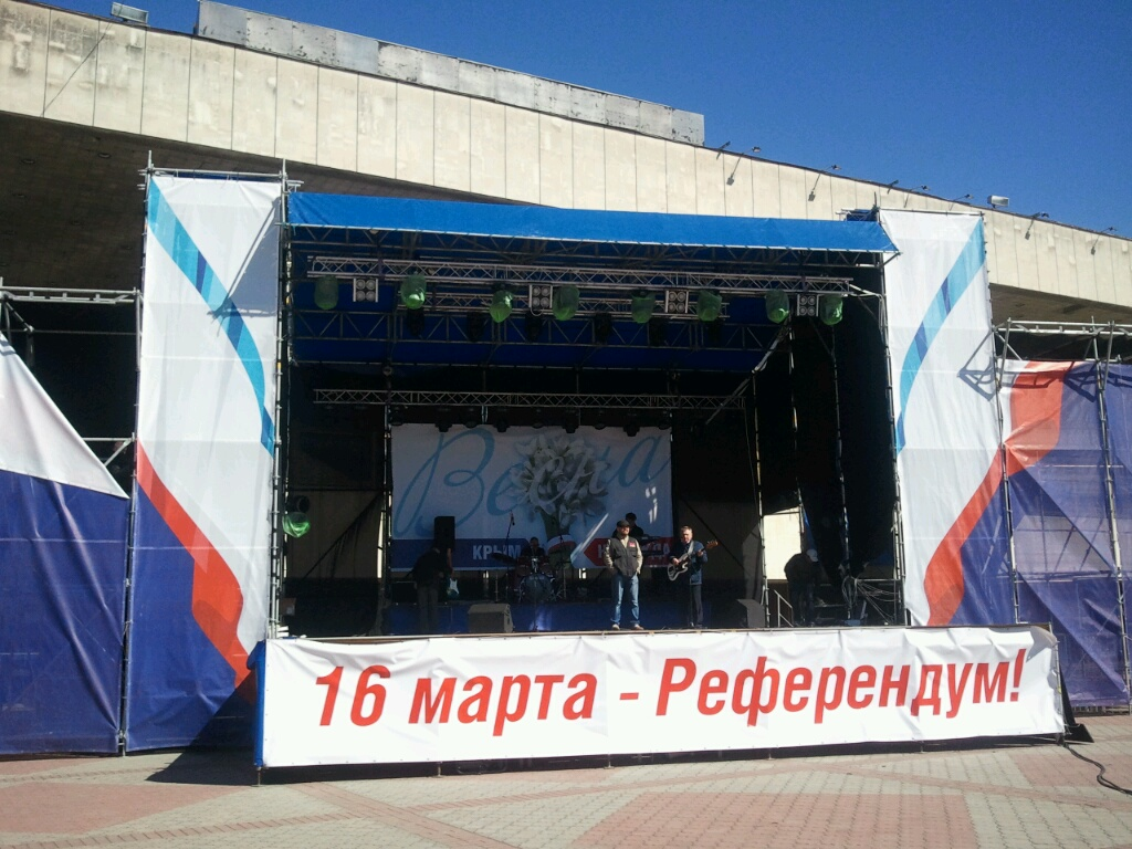 Сцена на пл.Ленина утром 17 марта 2014 года. Симферополь.